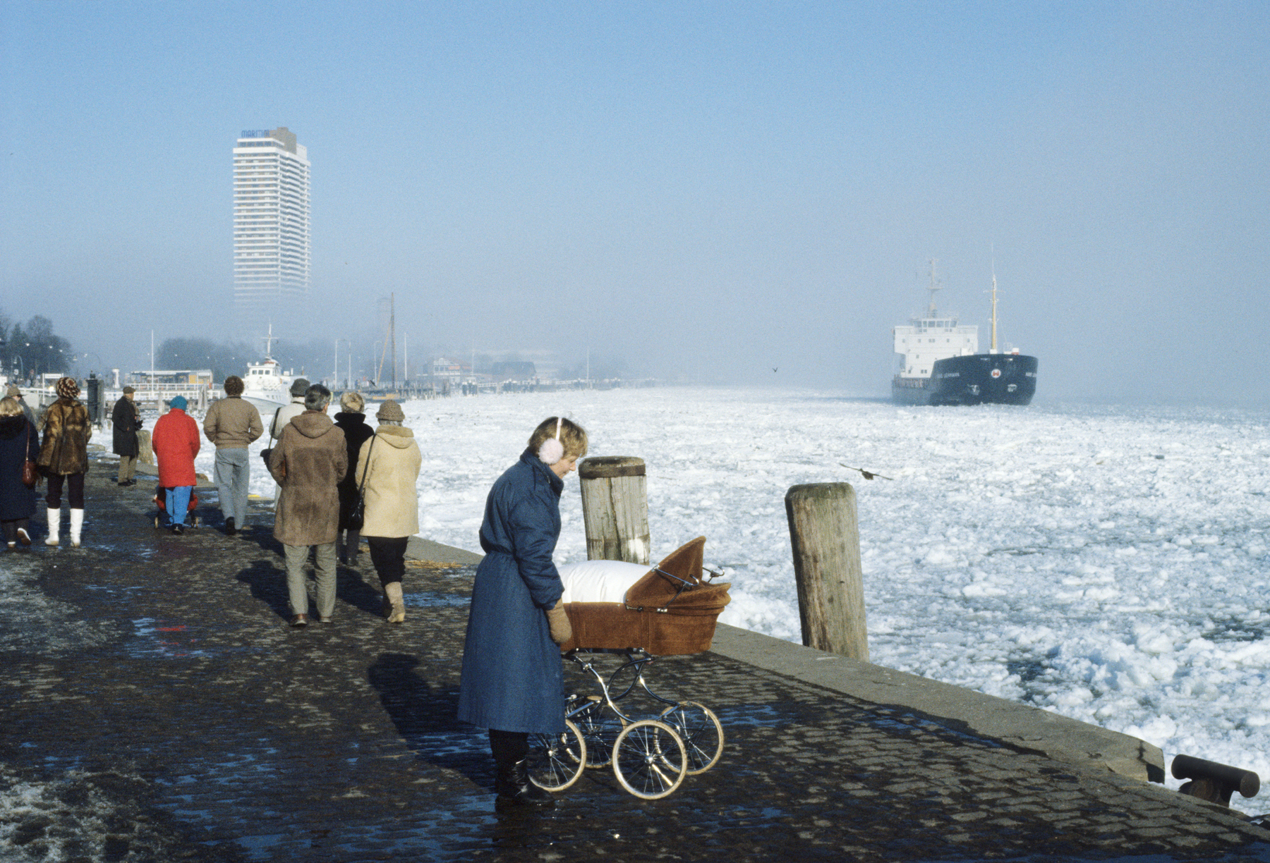 Travemünde mit vereister Trave im Februar 1986. Im Hintergrund der Lübecker Frachter „Hans Lehmann“ der Reederei Hans Lehmann.